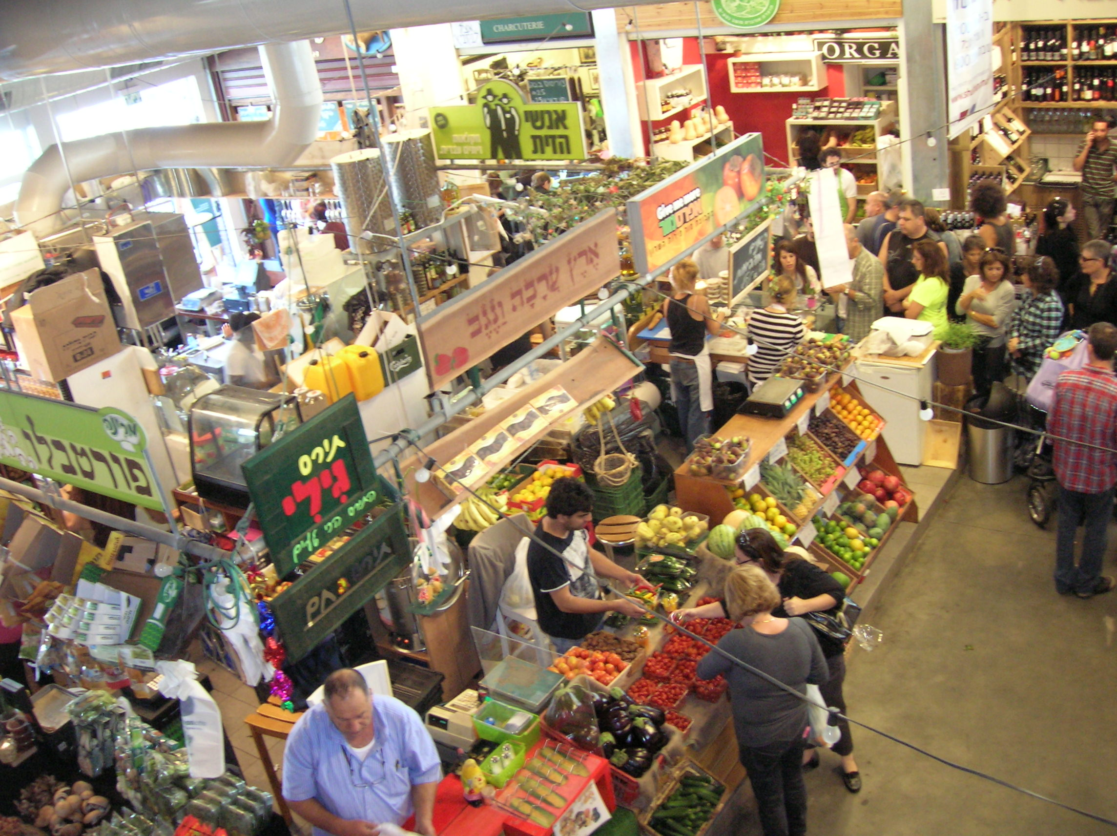 שוק הנמל תל אביב 13